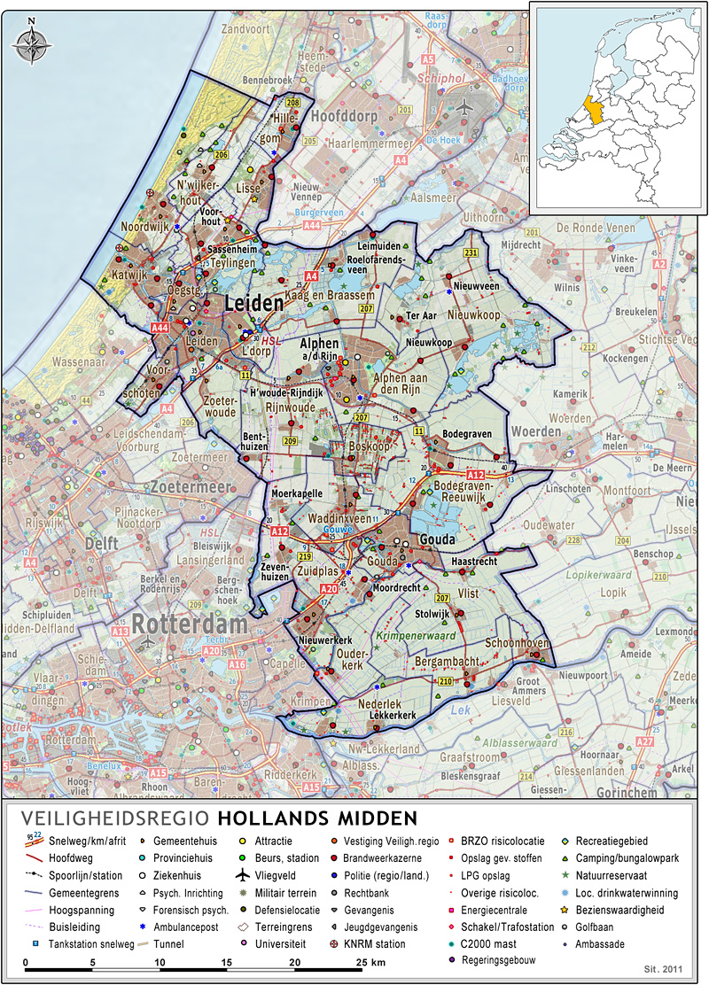 Veiligheidsregio Hollands Midden, met indeling van gemeenten (2011) en impressie van het landschap. Door Jan-Willem van Aalst, samengesteld uit publiek beschikbare geo-data: Referentie-ondergrond (kustlijn, steden, wegen) gerasterd uit de OpenStreet Map OSM. ( Inhoud is beschikbaar onder de Creative Commons Attribution-ShareAlike 3.0 license. Referentie-ondergrond op water bewerkt vanuit Gebruik is vrij met bronvermelding NLR en ESA. Vectorgrenzen van gemeenten en regio's vrij ter beschikking gesteld met dank aan cartografen van brandweerregio's Hollands-Midden en IJsselland; gerasterd in Adobe Photoshop. Grenzen en kazernes in Duitsland en België vrij ter beschikking gesteld met dank aan Meldkamer Oost-Nederland, Regio Limburg-Noord en Regio Midden- en West-Brabant Hoogte-aanduidingen (reliëf) gerasterd uit de AHN Viewer ( gebruik is vrij met bronvermelding (c) AHN, BRZO risicolocaties, LPG risicolocaties, buisleidingen: op basis van de Risicokaart, Defensie locaties op basis van de lijst op Locaties C2000 masten op basis van Penitentiaire locaties op basis van Rijksoverheid site Recreatieve verblijfslocaties op basis van gebruik is vrij met bronvermelding "(c) Kenniscentrum Recreatie". Natuurreservaten op basis van Kilometerpalen (iedere 5 km) op basis van Stichting Incident Management Nederland ( vrij bruikbaar met bronvermelding Overige kenmerken op de kaart: eigen tekenwerk van Jan-Willem van Aalst, op basis van OpenStreet Map en gerasterde CBS gemeentegrenzen.